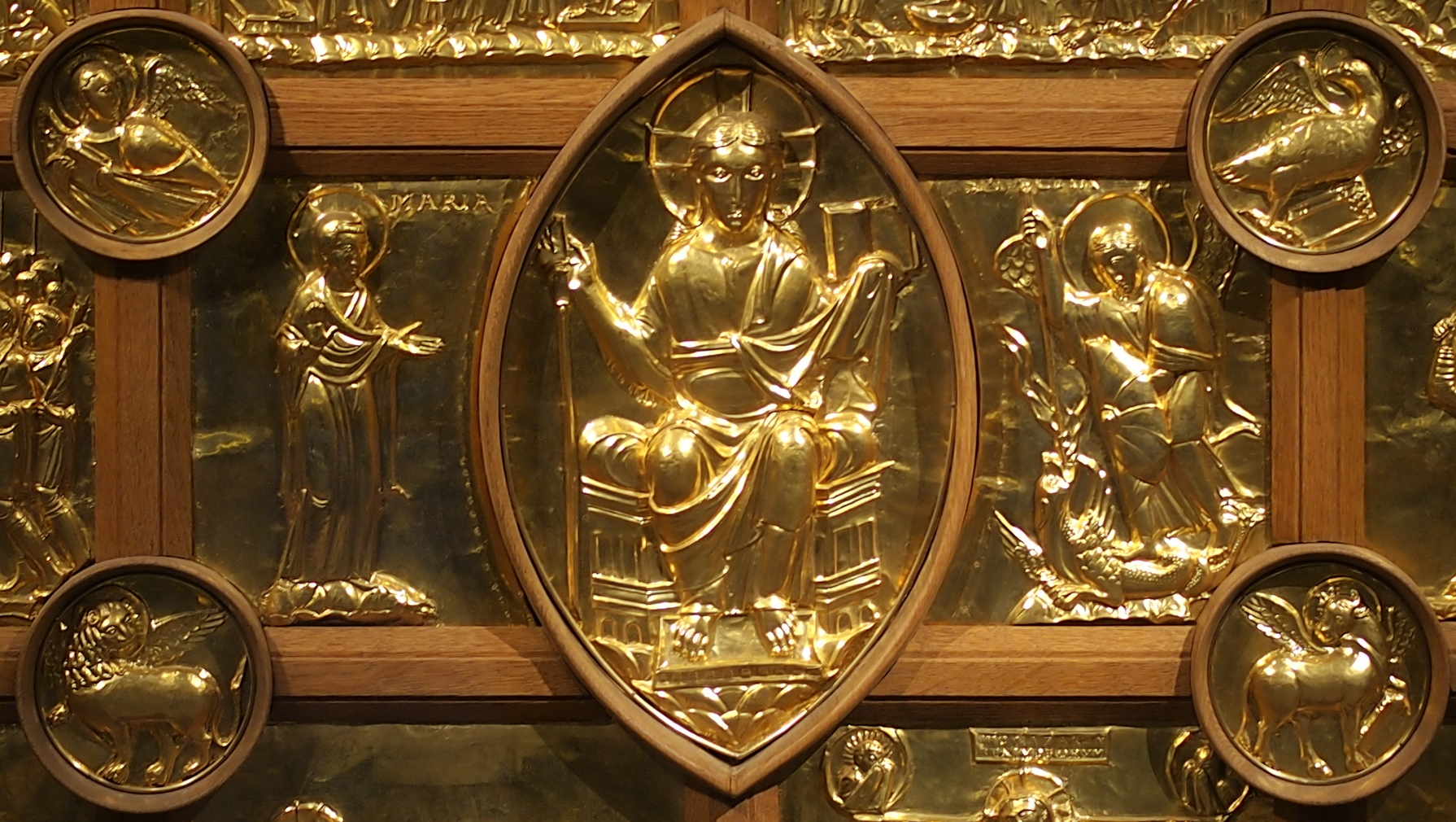 Westseite des Altarstisches im Dom in Aachen, Zentralmotiv umgeben von Symbolen der vier Evangelisten, Denkmal